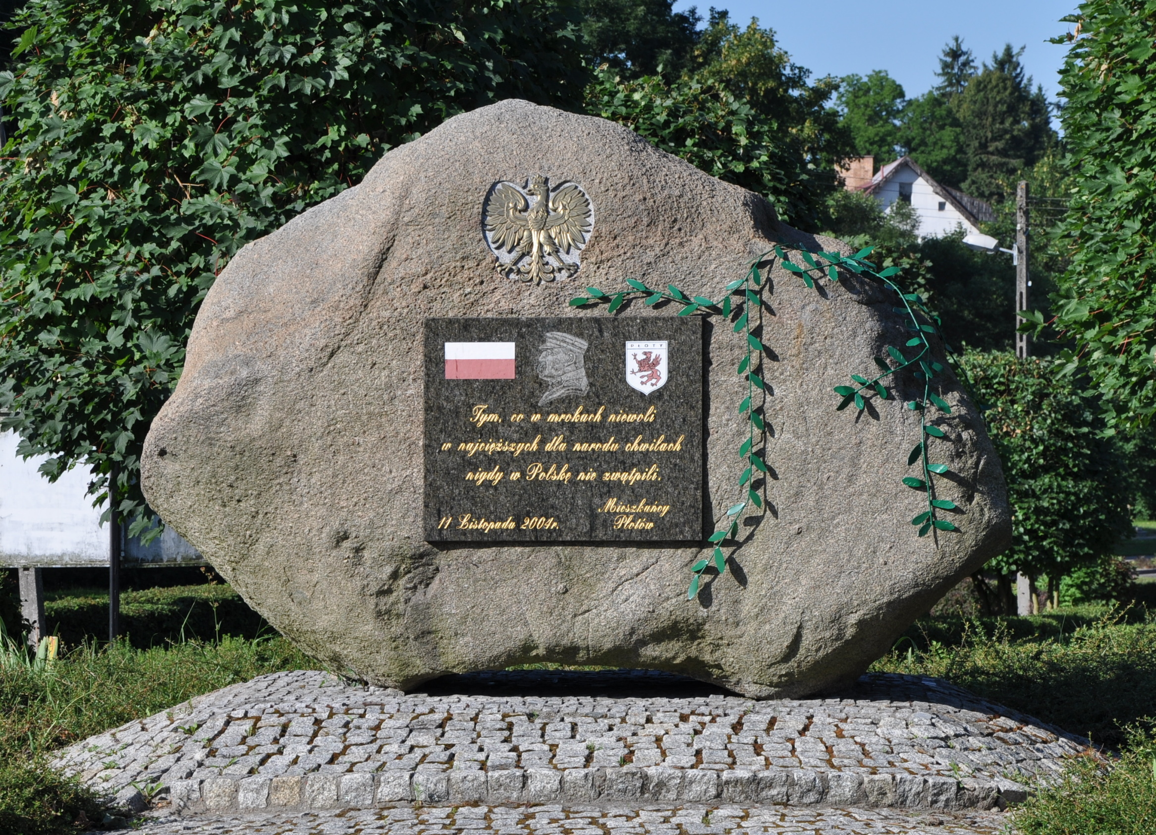 Pomnik z 2004 roku przed urzędem miejskim z inskrypcją: "Tym, co w mrokach niewoli w najcięższych dla narodu chwilach nigdy w Polskę nie zwątpili. 11 listopada 2004 Mieszkańcy Płotów"